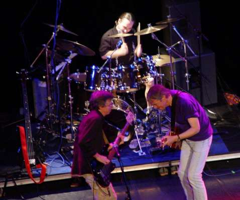 Die Band Camel bei einem Konzert am 25.10.2003